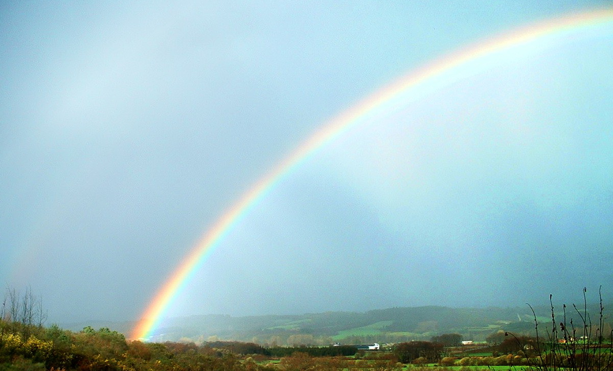 Arco_da_vella Galiza'vistas desde el hotel (I)'